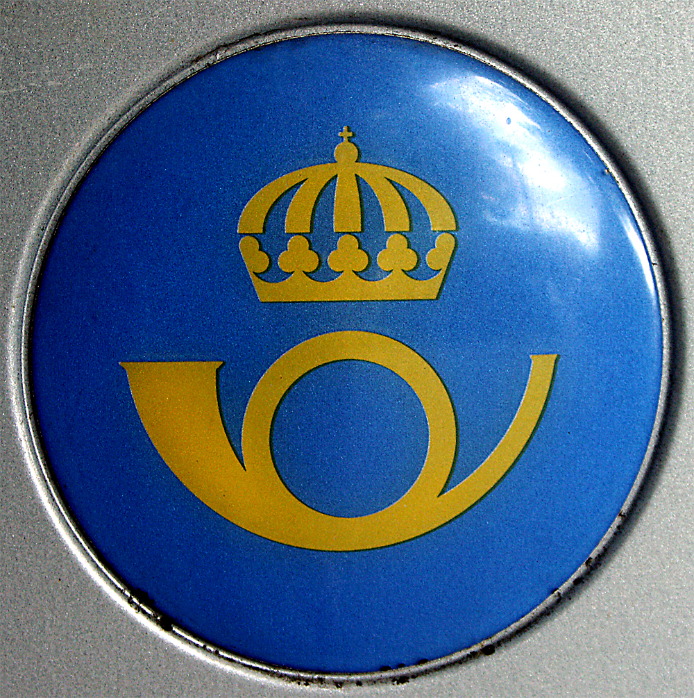 Posthorn på postlåda i centrala Lund